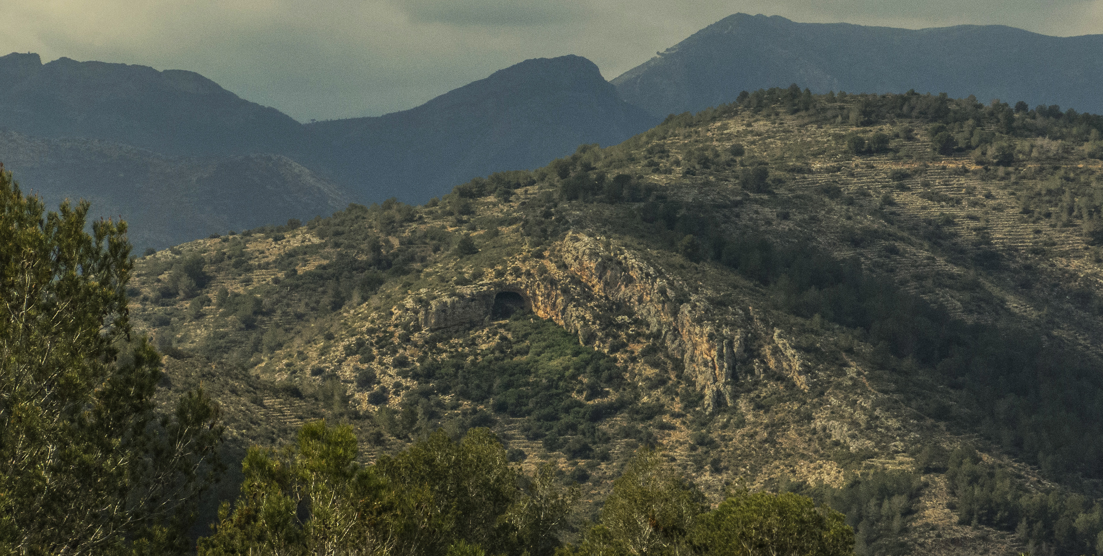 La Cova de la Garganta té un recorregut de 59 metres i una amplària d'uns 13 metres. La seua altitud, des de la base al seu sostre natural, arriba als 3'5 metres de mitjana. Està situada al municipi de Senija, al nord de la població principal del municipi (Marina Alta)